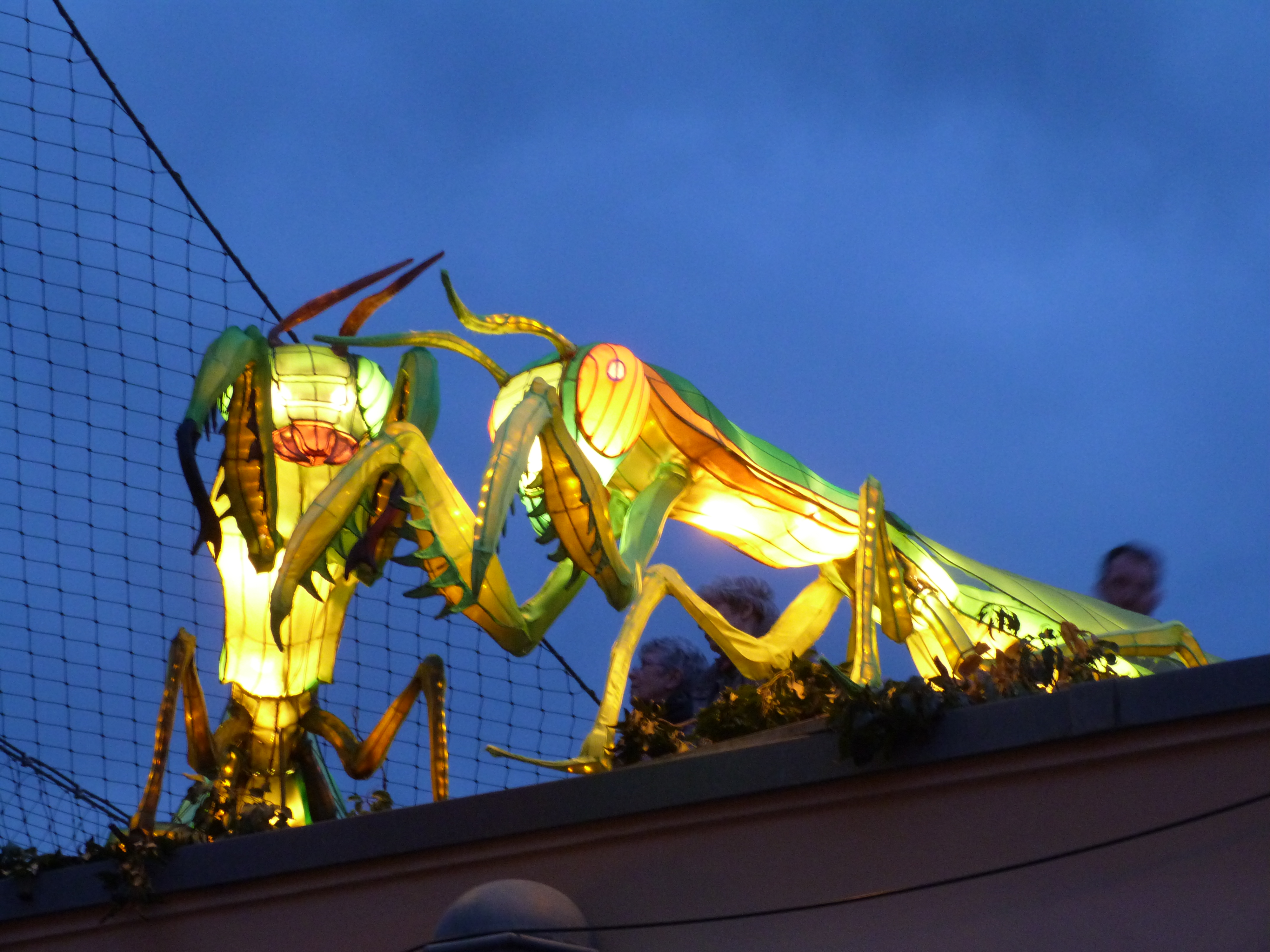 Magische Lichterwelten 2018, Zoo Halle (Saale)